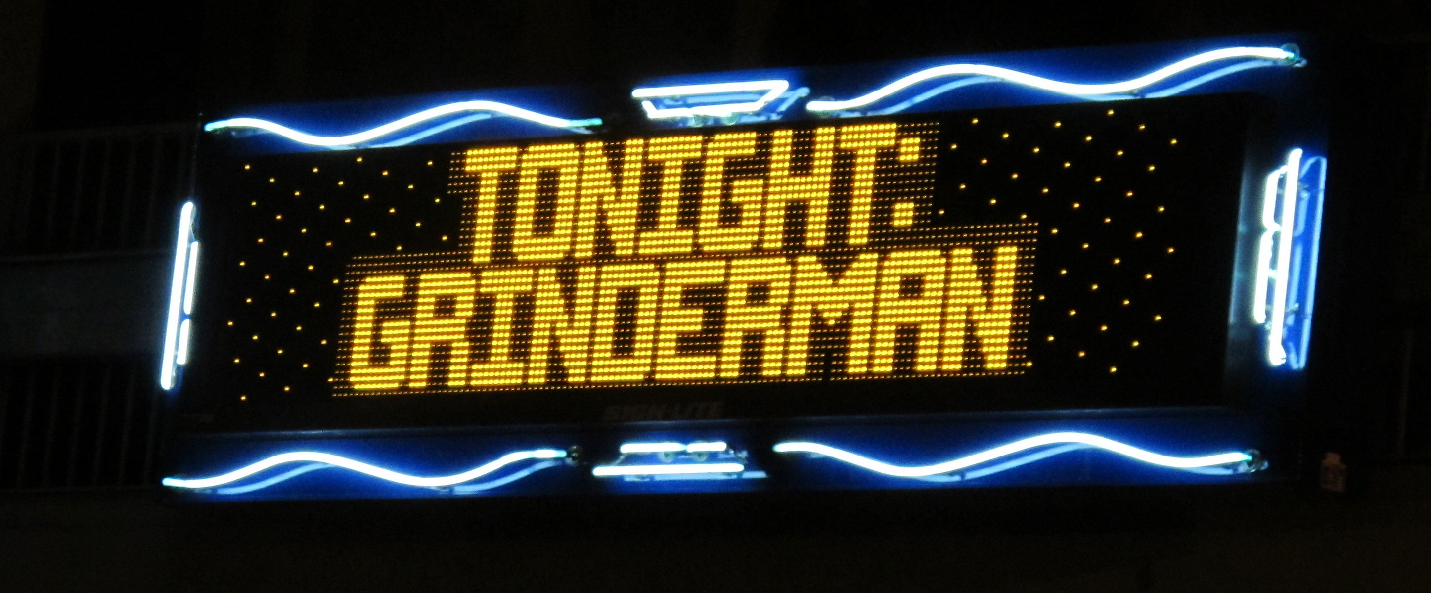 Реклама концерта Grinderman